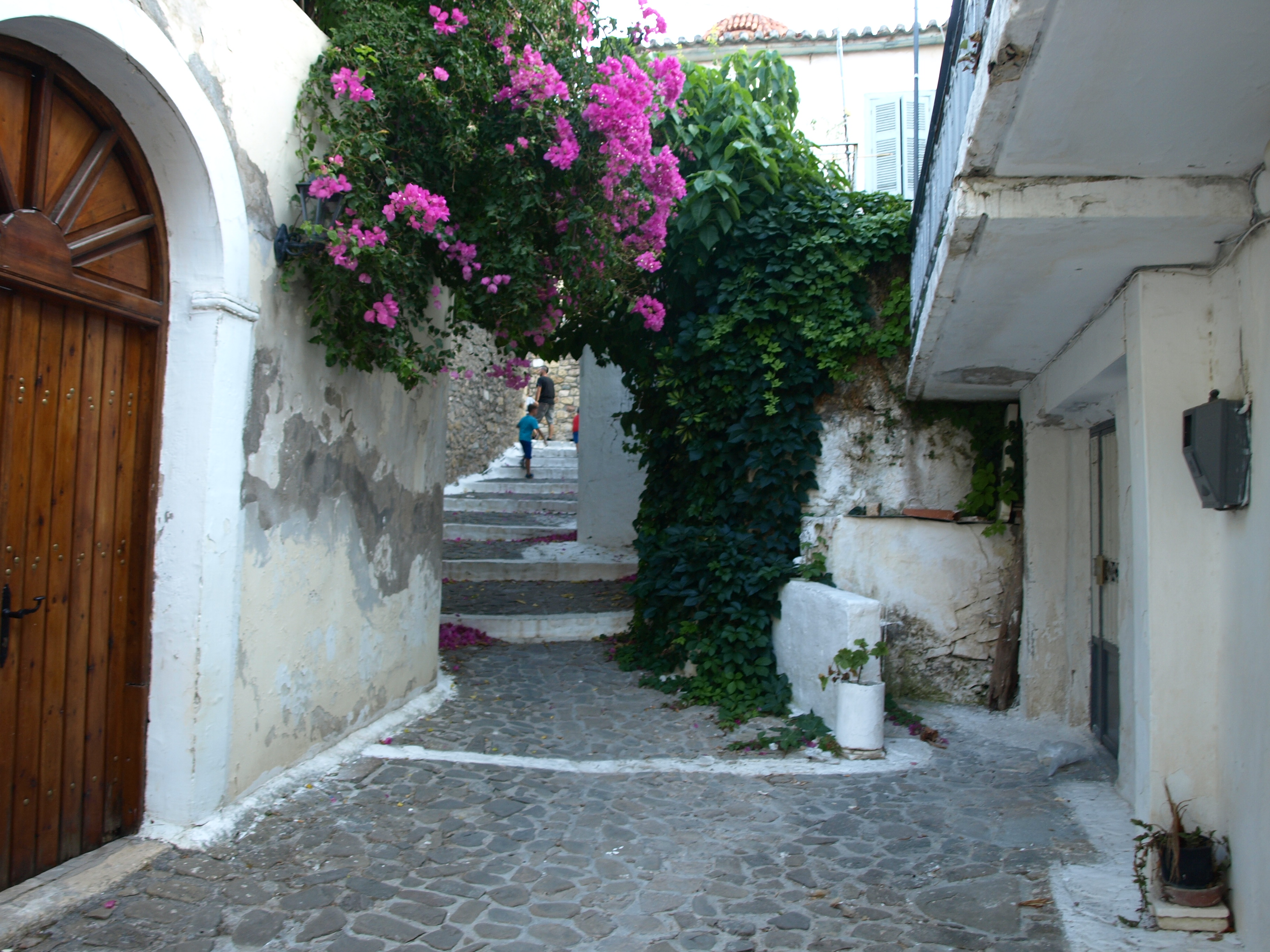 Κάστρο Κορώνης«Κάστρο Κορώνης»